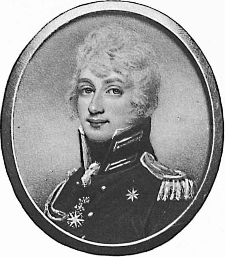 Граф Владимир Фёдорович Васильев (1782-1839